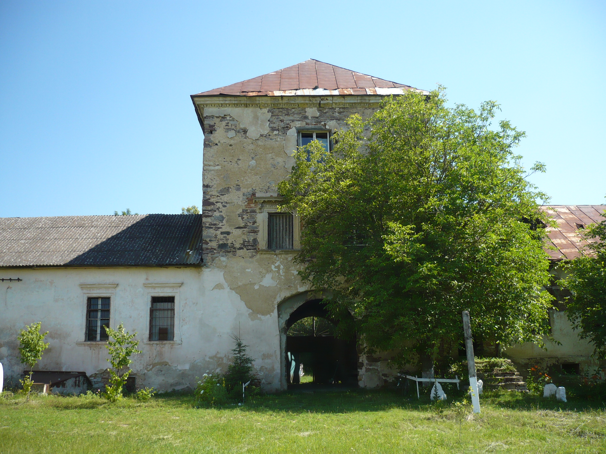 Potok Złoty. Zamek